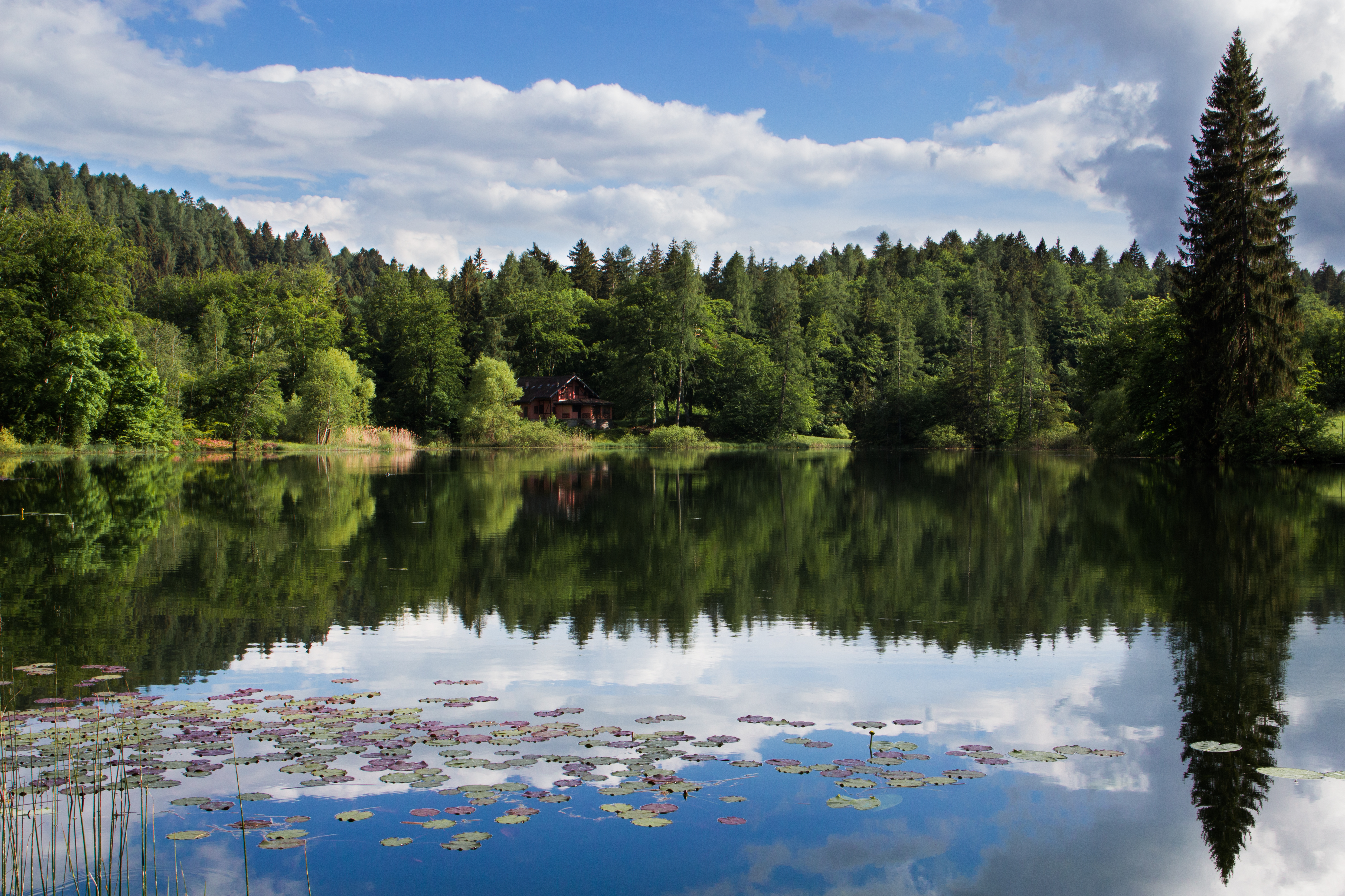 Biotopo Prà dell'Albi-Cei (Q3640240)